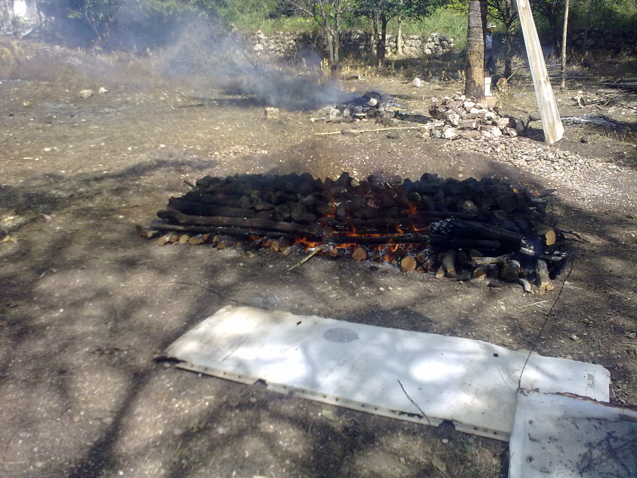 horno encendido